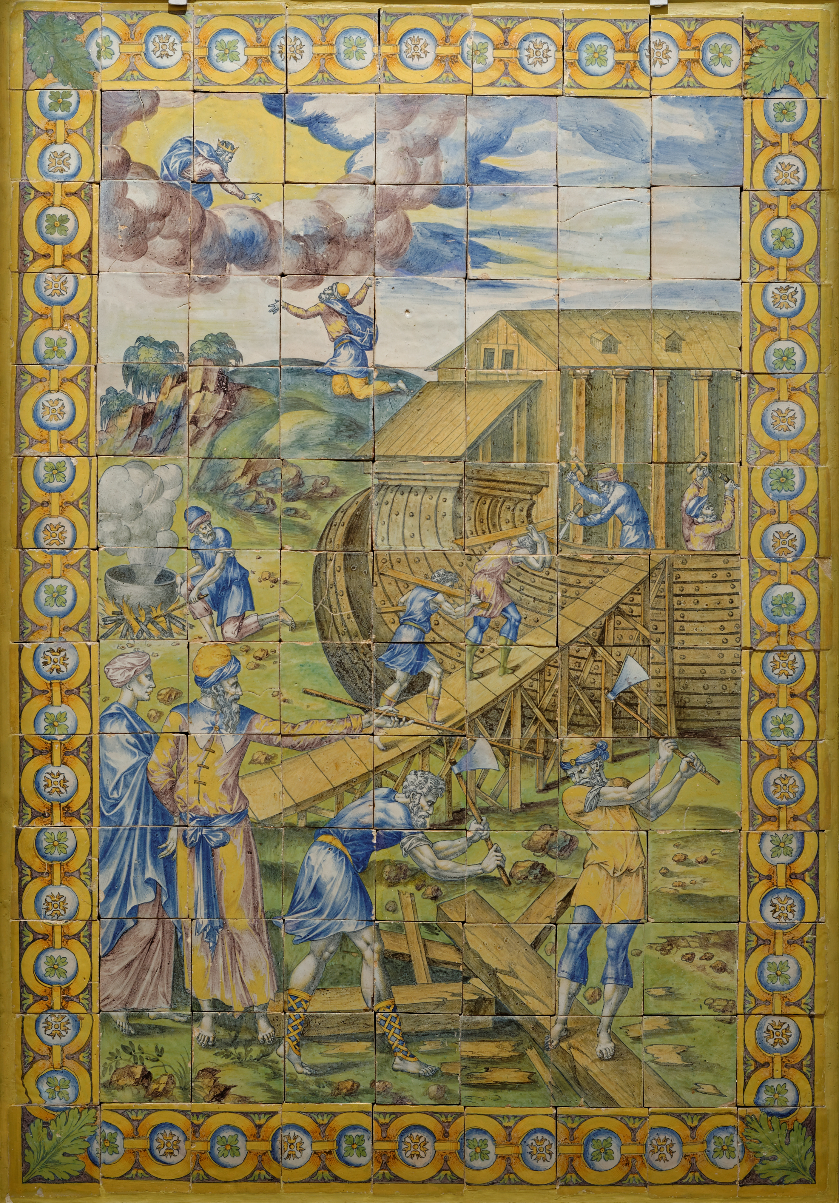 Masséot Abaquesne (actif de 1526 à avant 1564), La Construction de l’arche de Noé. Vers 1550-1560. Terre cuite émaillée Écouen, Musée national de la Renaissance – château d’Écouen